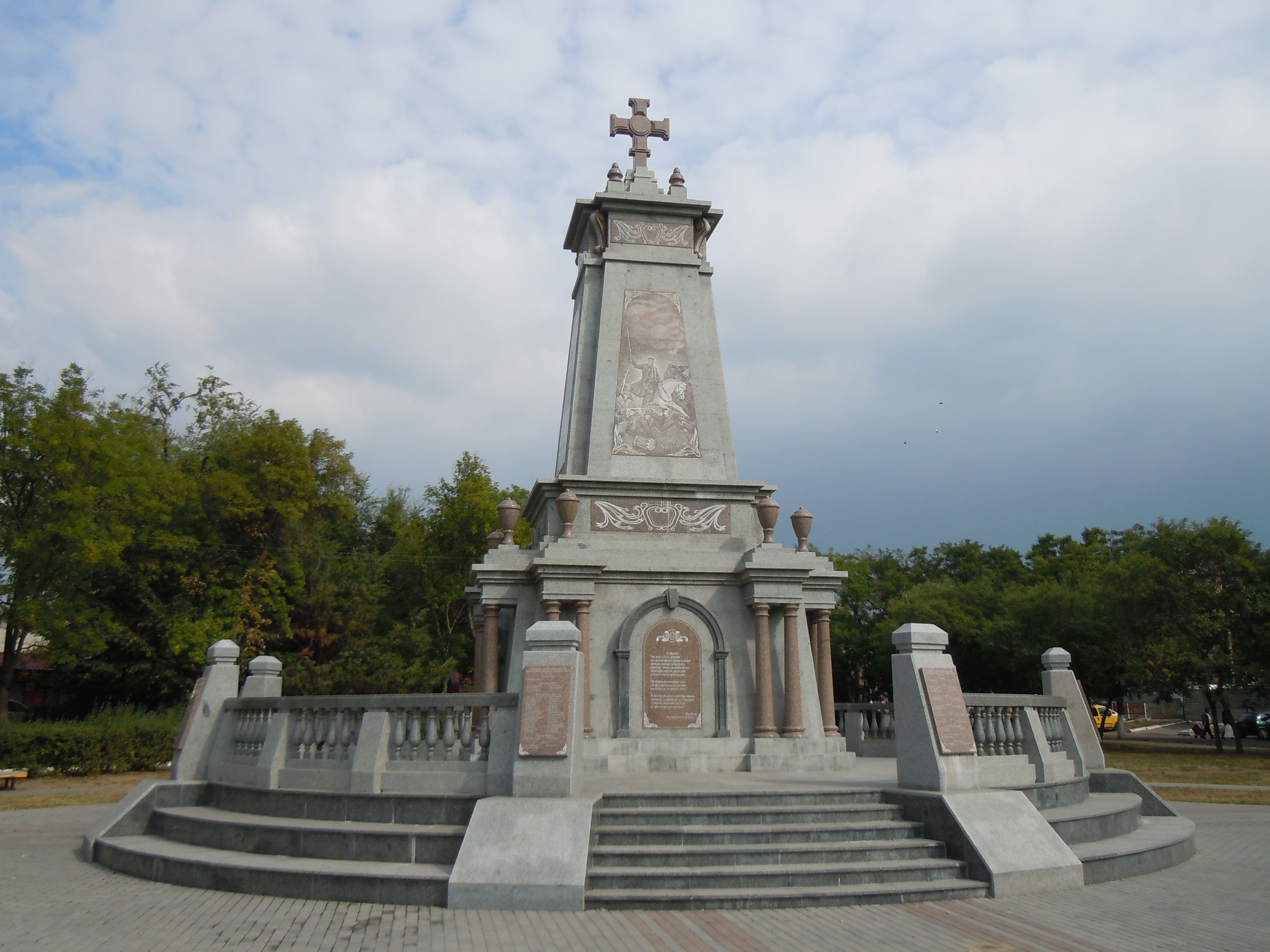 Пам'ятник Болгарському повстанню в Болграді